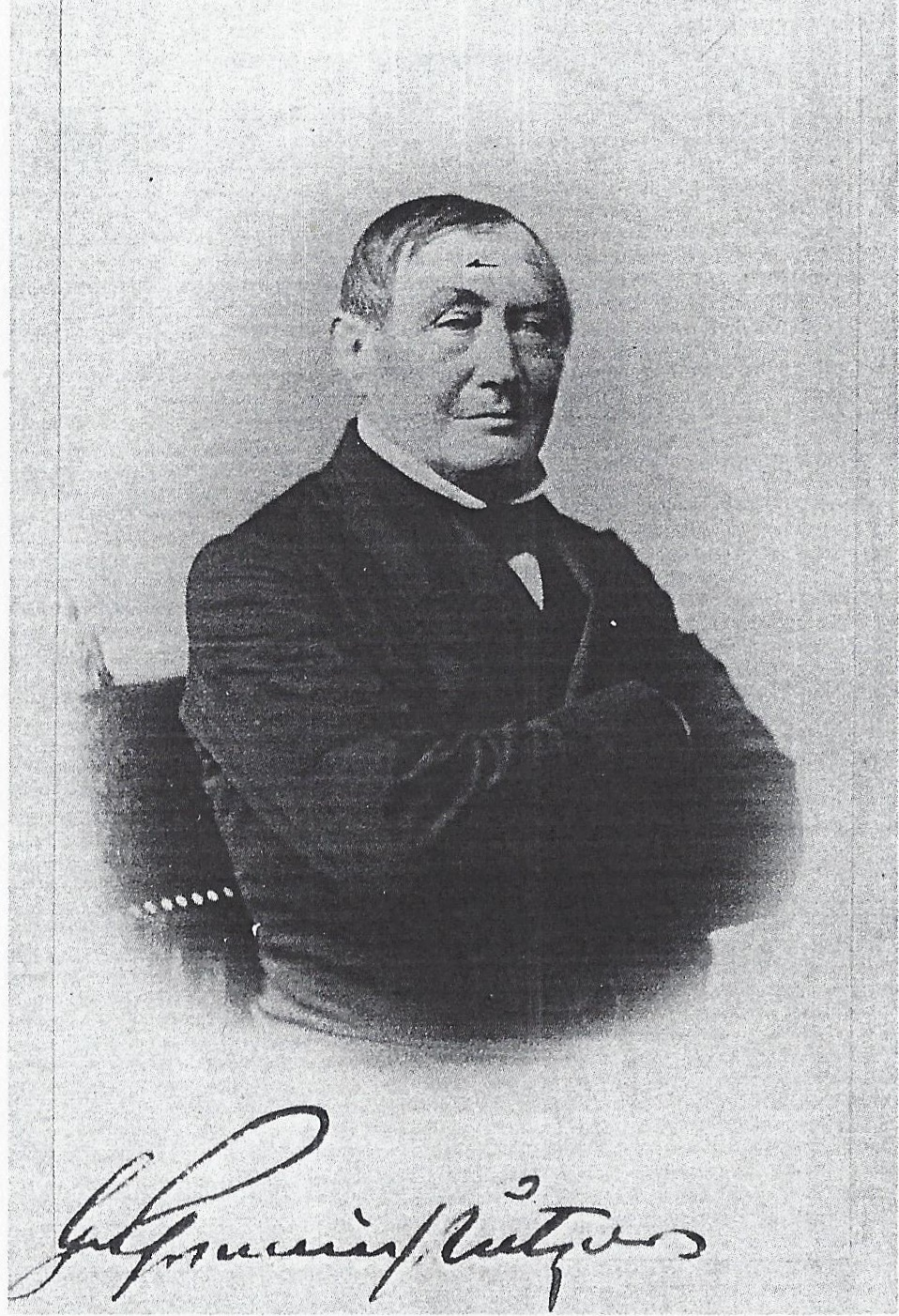 Porträtfotografie von Graf Maximilian von Schwerin-Putzar (1804-1872)